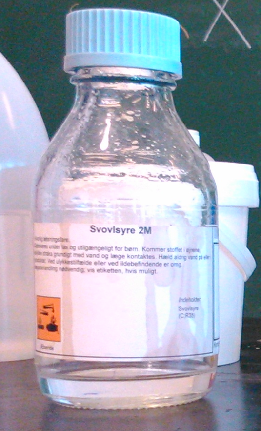 Flaske med 2M svovlsyre